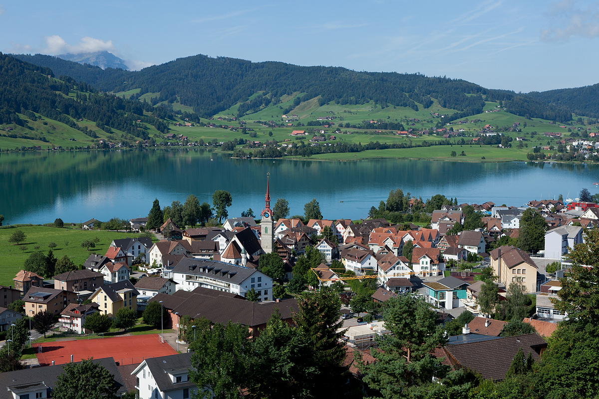 Blick vom Institut Pfister auf Oberägeri und den Ägerisee